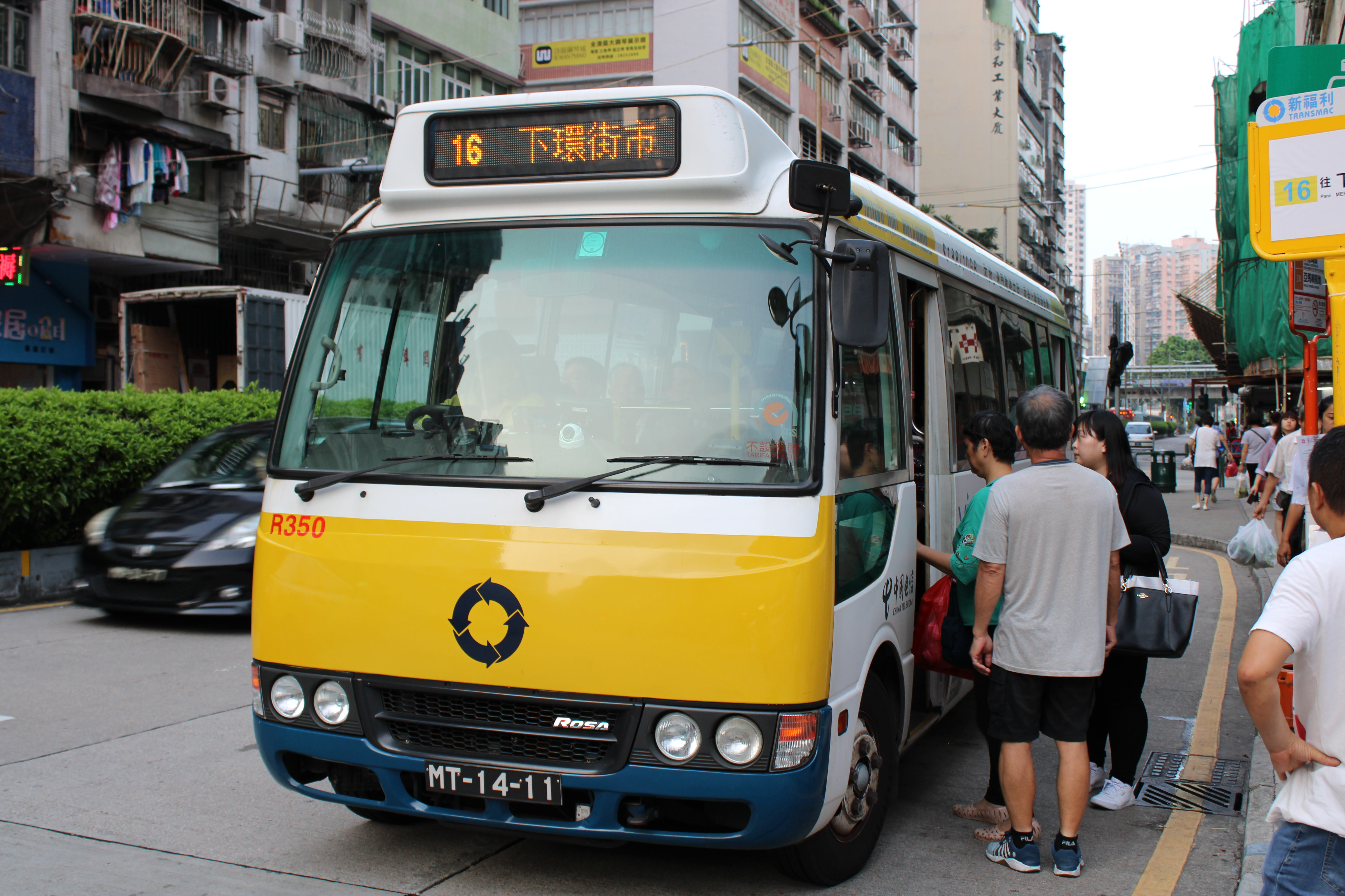 新福利三菱Rosa小巴行駛16路線。